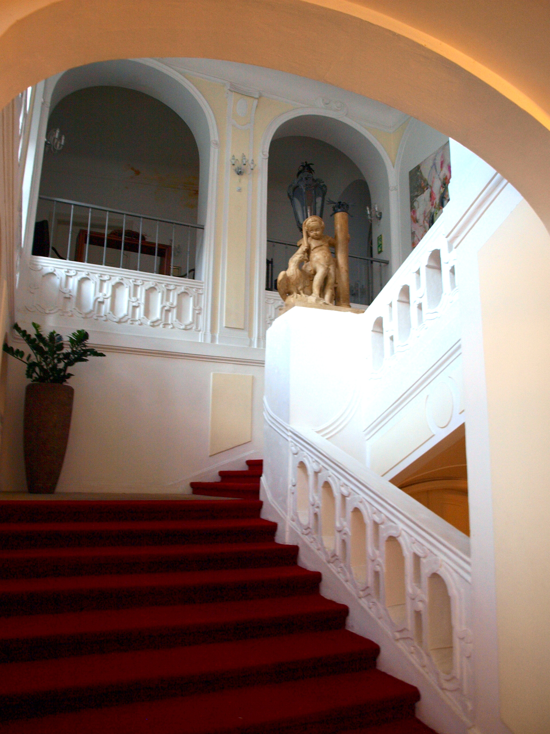 Pachtovský palác